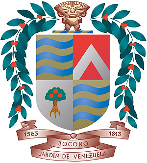 Escudo de Boconó